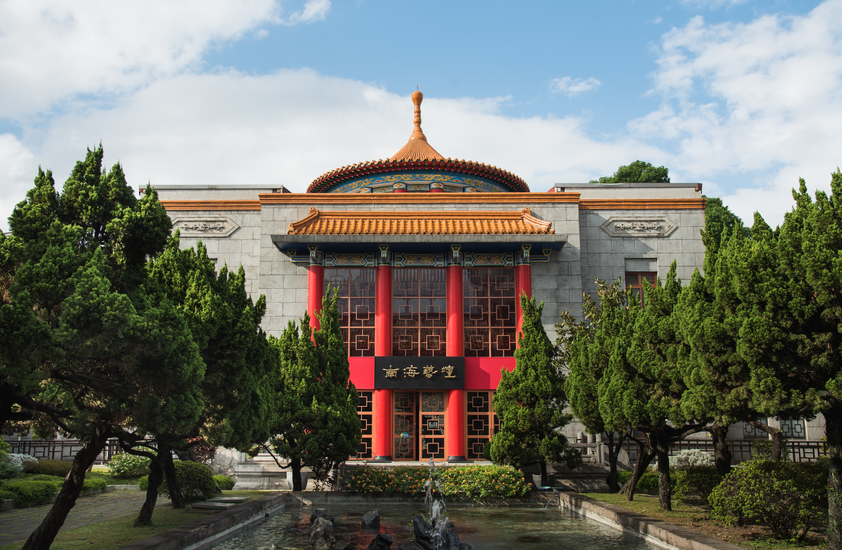 於1957年成立，位於南海書院後棟的展覽室正門